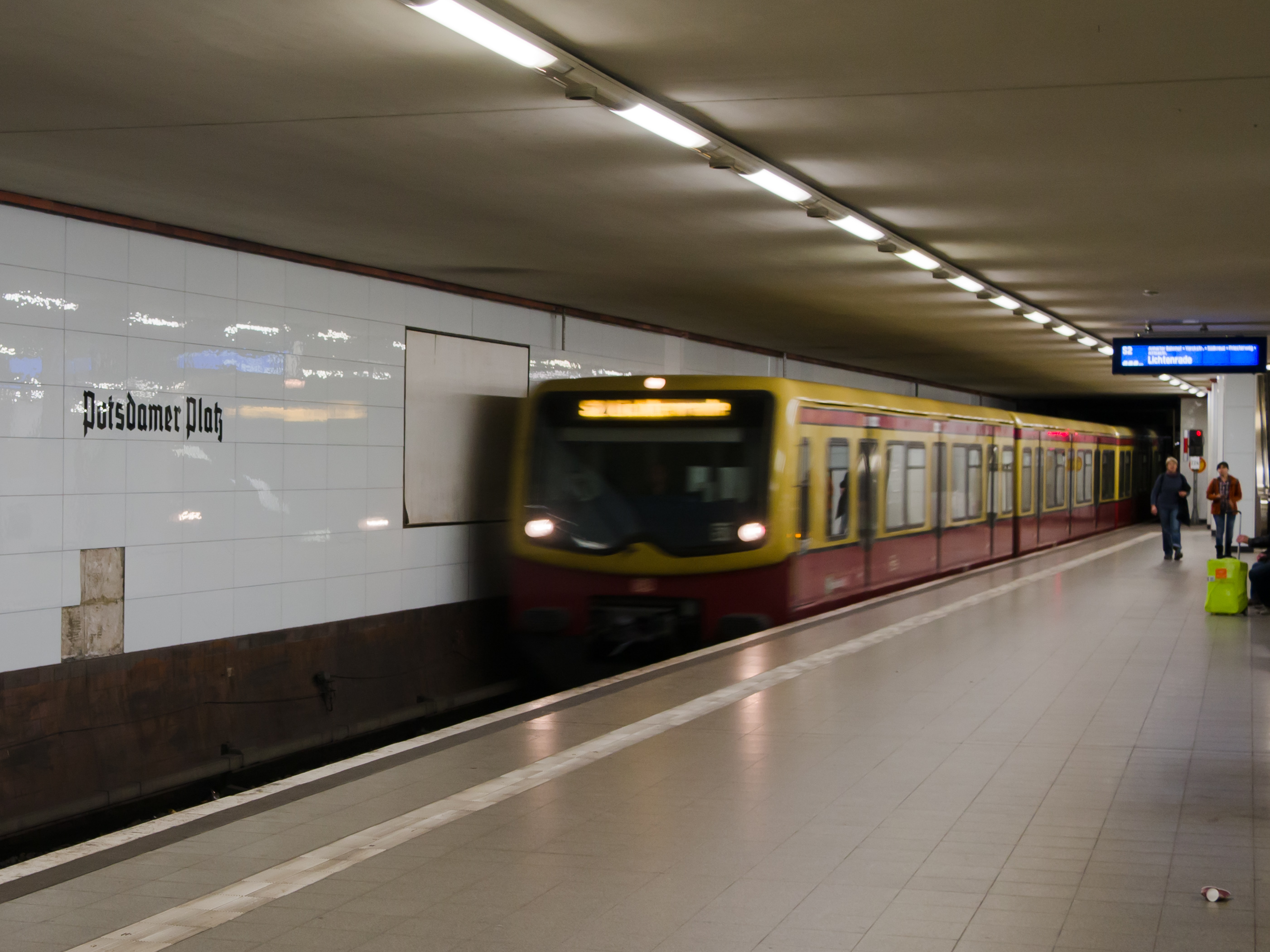 S-Bahn-Einfahrt am S-Bahnhof Potsdamer Platz